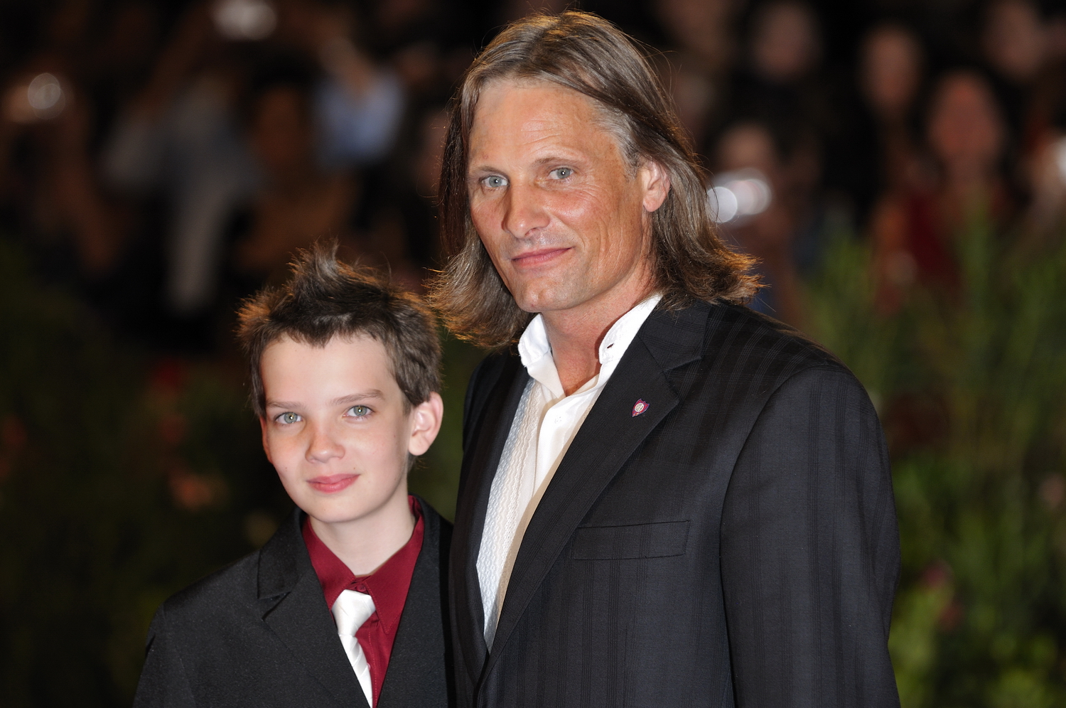 66ème Festival du Cinéma de Venise (Mostra), 2ème jour (03/09/2009) Tapis Rouge avec Viggo Mortensen pour le film : The Road